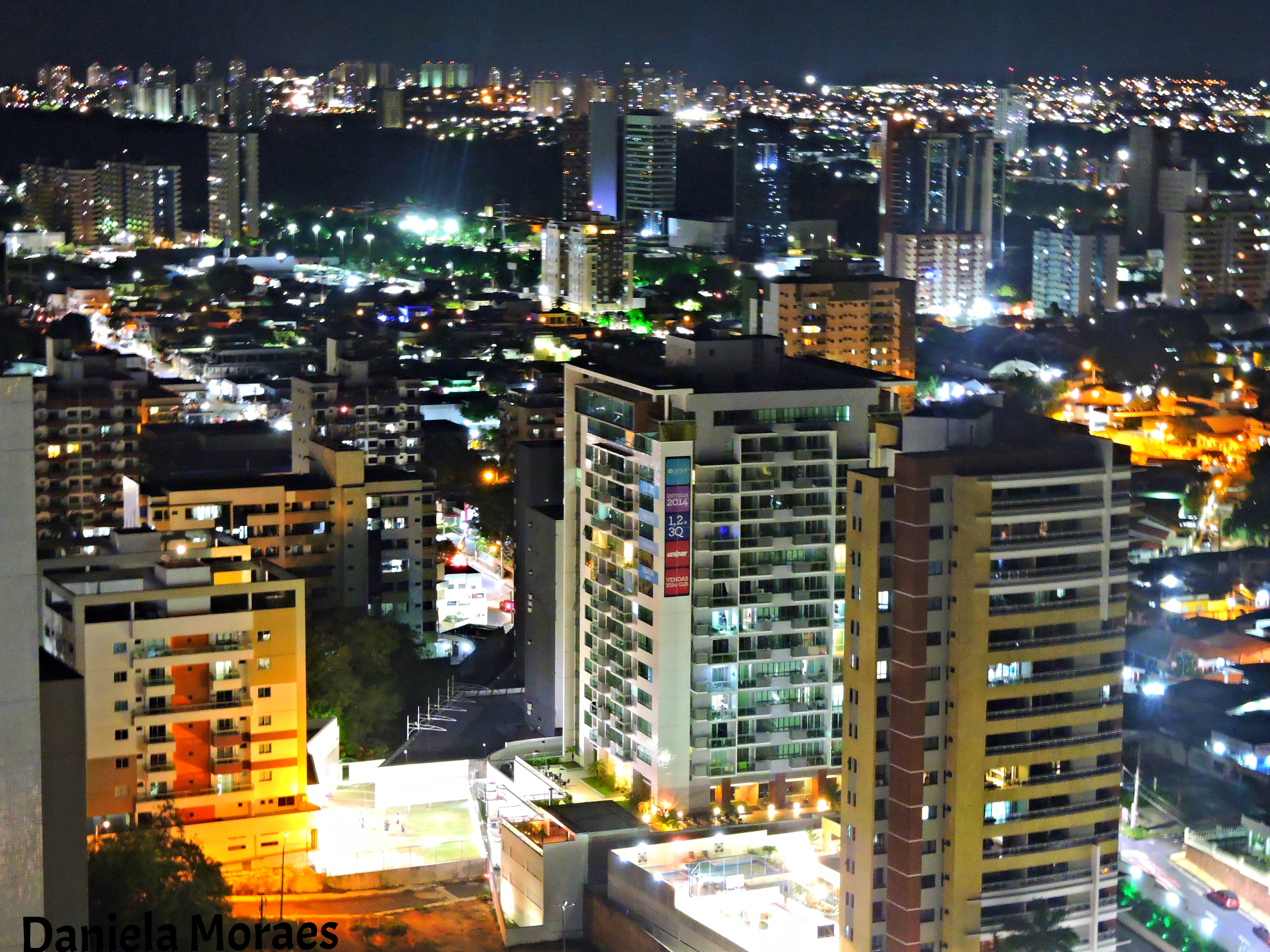 Vista parcial da cidade de Manaus, capital do Amazonas.